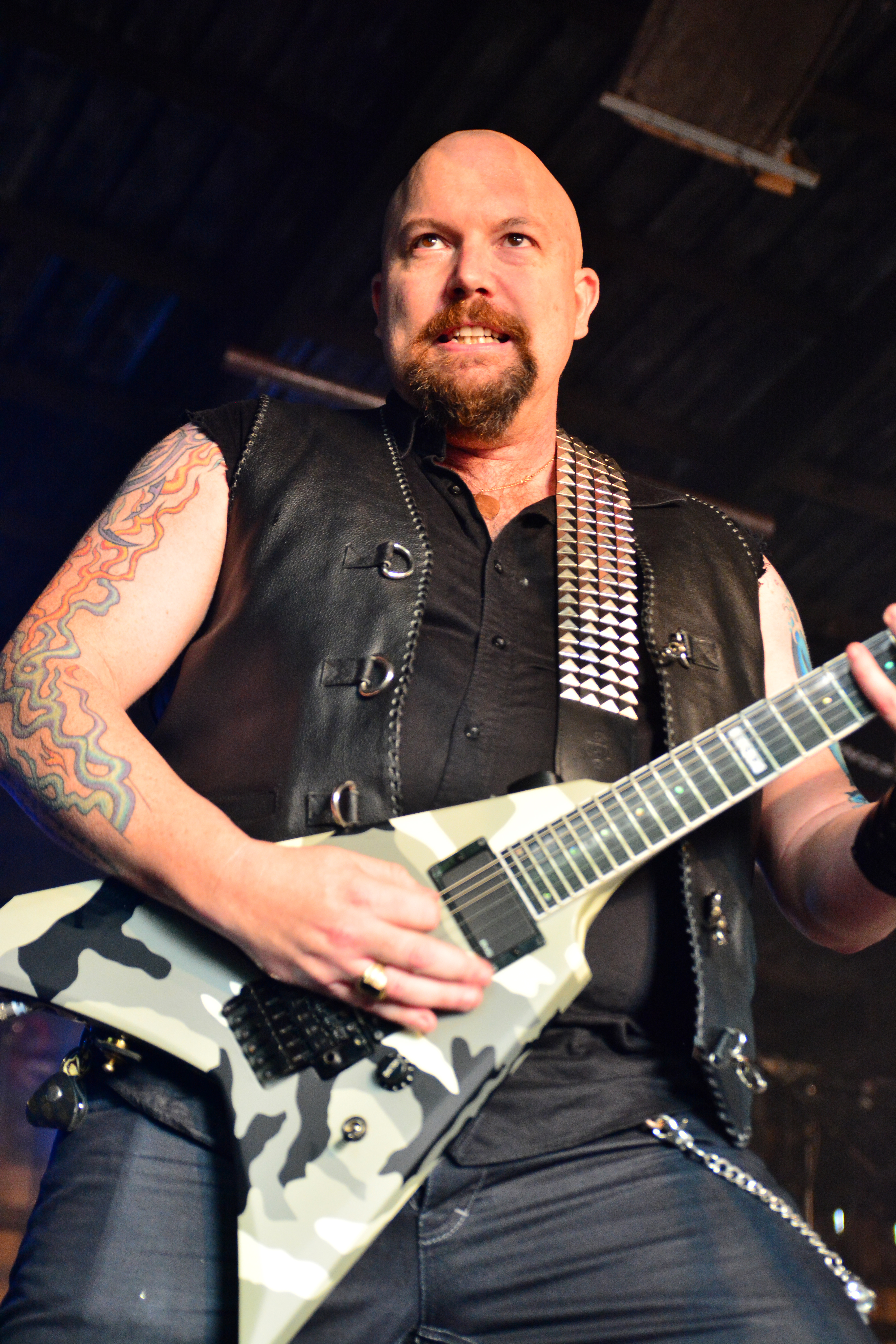 Death Dealer beim Headbangers Open Air 2015